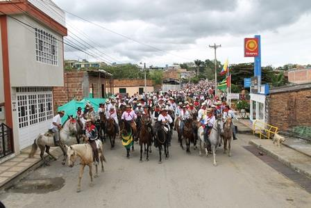 cablagata 8 de mayo